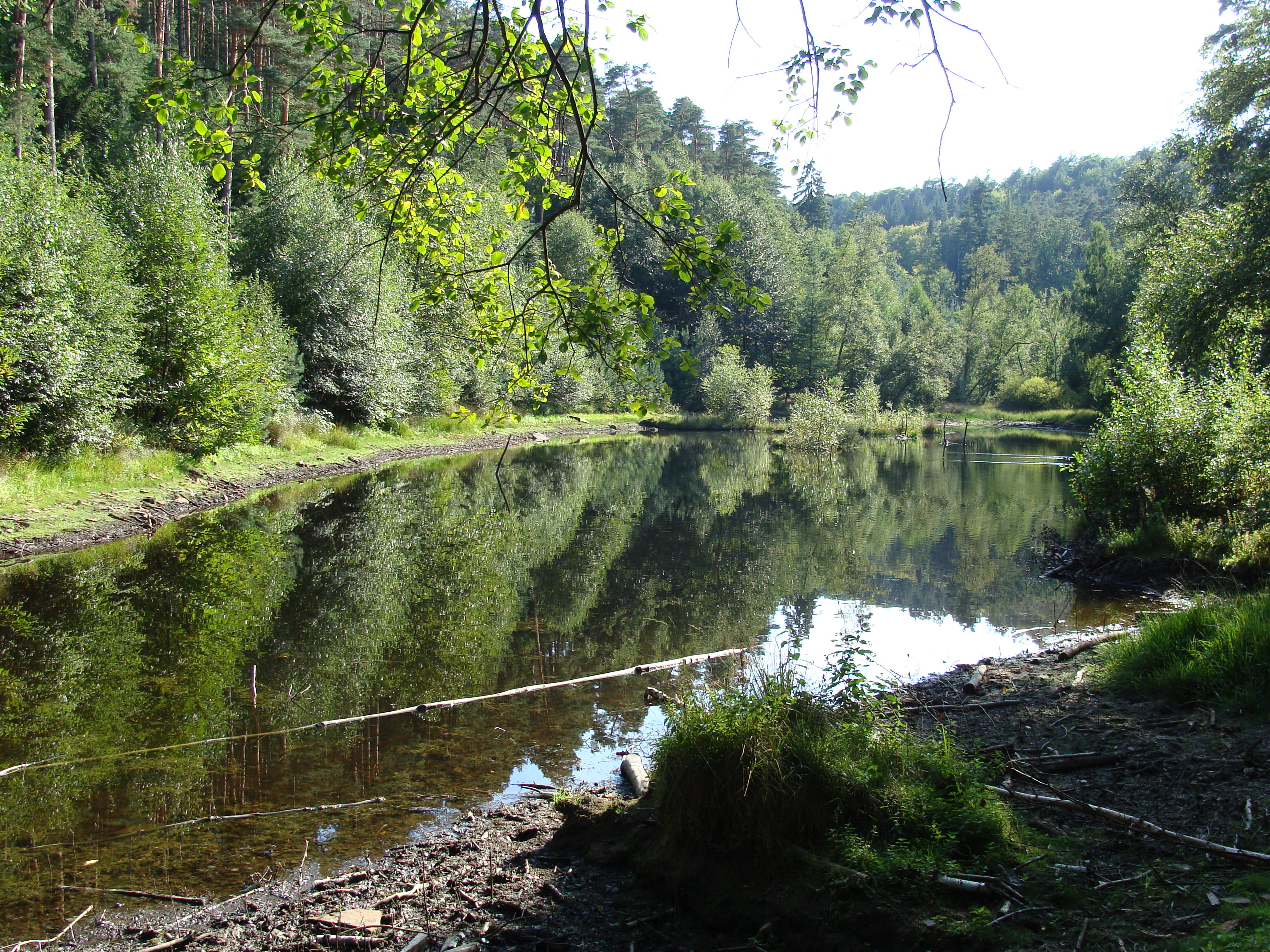 Ungeheuersee bei Weisenheim am Berg im Pfälzerwald